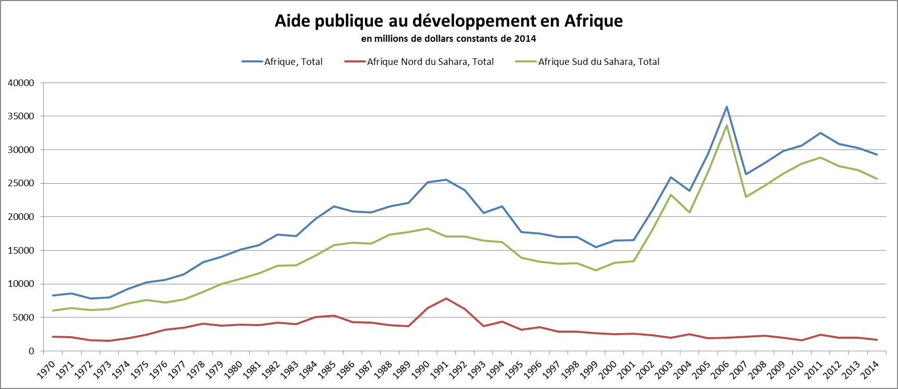 Aide publique au développement en Afrique, 1970-2014